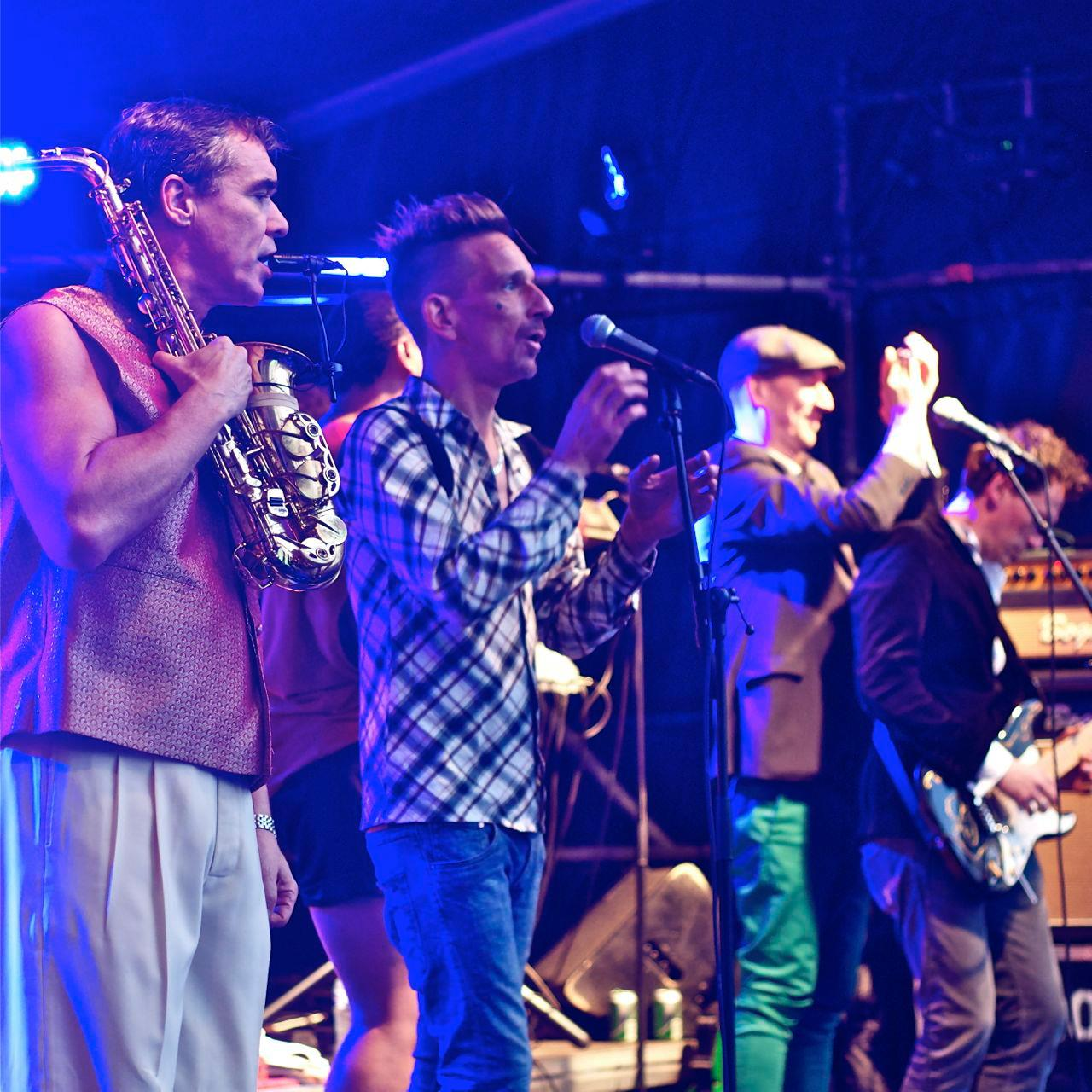 Gotcha! tijdens koninginnedag 2013 in Haarlem